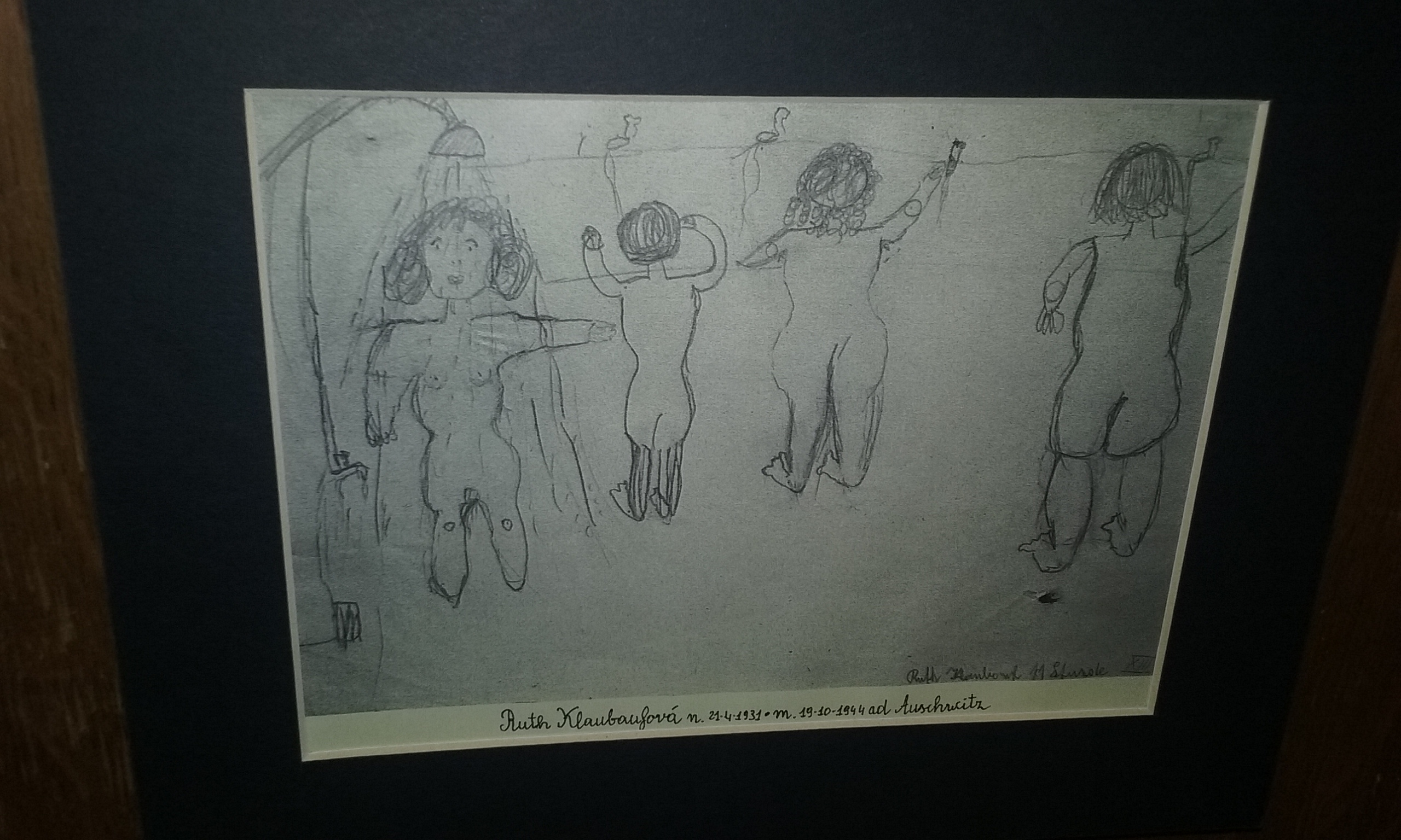 Dipinto realizzato da un'alunna di Friedl nata il 21/04/31 e morta ad Auschwitz il 19/10/1944. Fotografia scattata il gennaio del 2016 a Pisa durante una mostra organizzata in onore di Friedl.